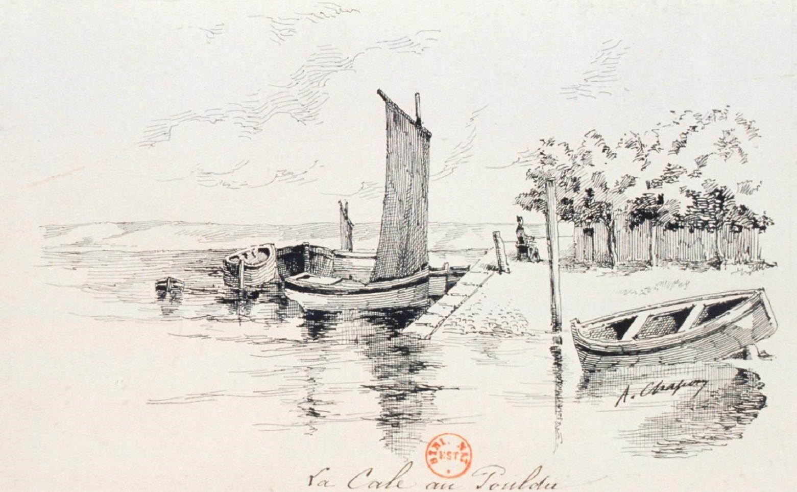 La cale au Pouldu au XIXème siècle (dessin à la plume et à l'encre de Chine de A. Chapon, bibliothèque nationale)